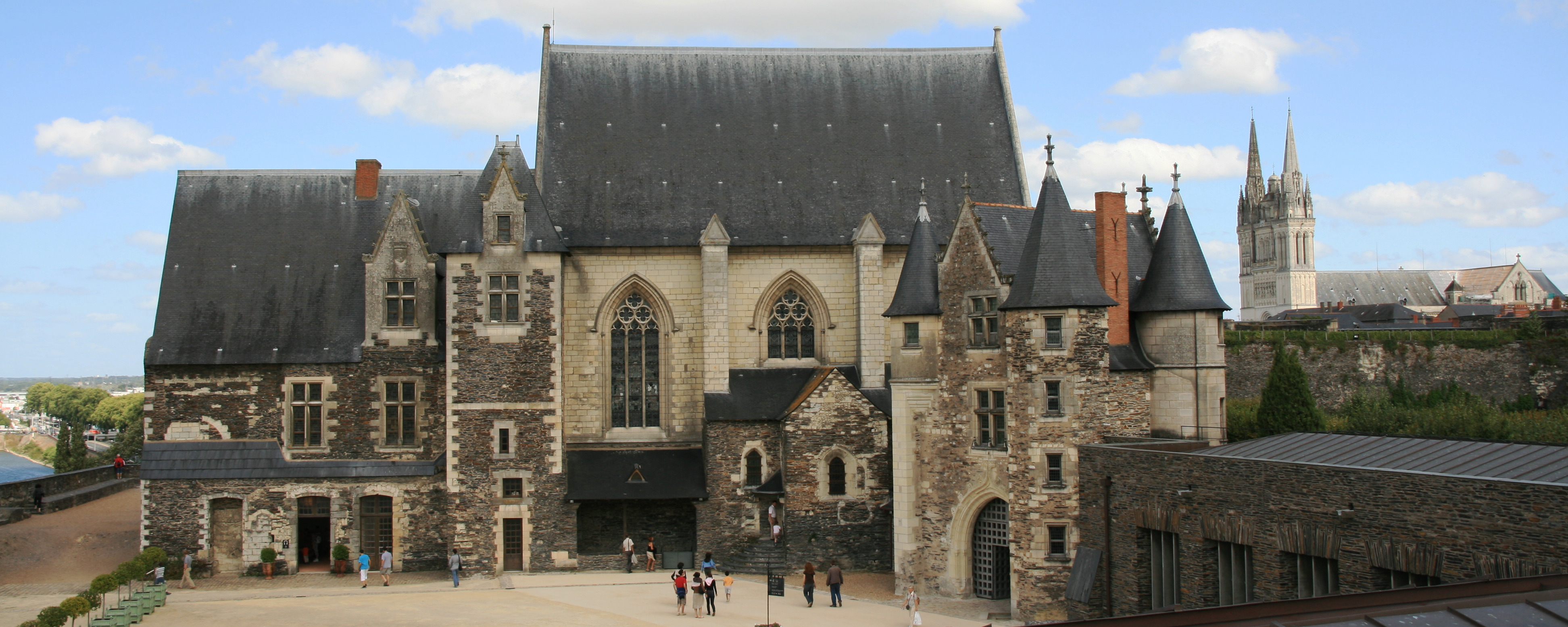 Vue de l'intérieur du château d'Angers (France), depuis le haut des remparts sud : de gauche à droite, le logis royal, la chapelle, le châtelet et les nouveaux bâtiments abritant la tapisserie de l'apocalypse. À l'arrière-plan à droite, la cathédrale Saint-Maurice.